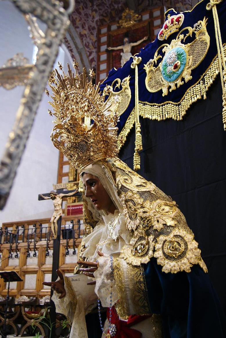 Nuestra Señora de la Estrella de Ávila